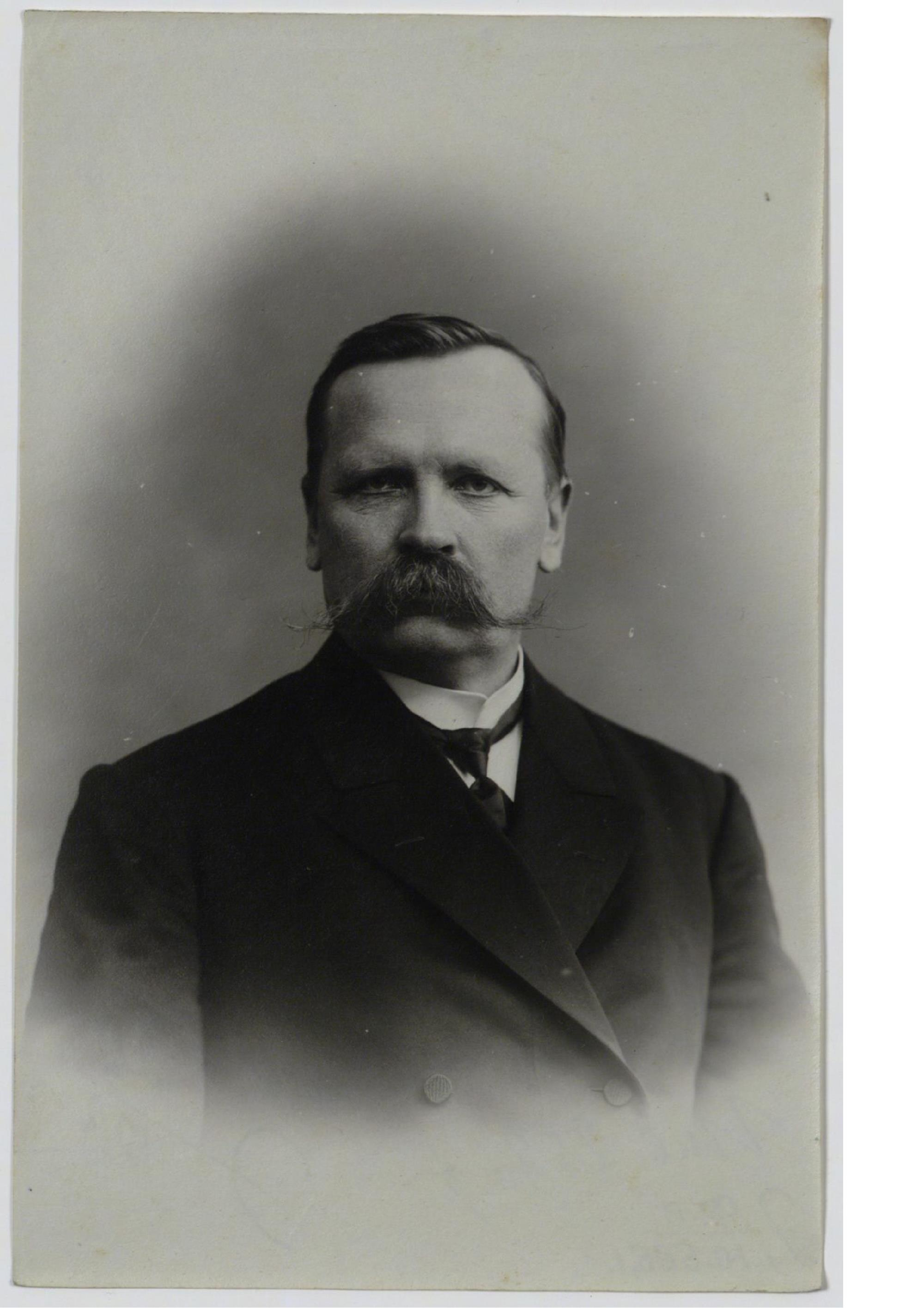 Юргенштерн А.Г. [Депутат Государственной Думы]